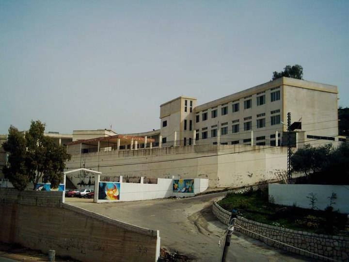 مدرسة عبا الرسمية - بلدة عبا - جنوب لبنان